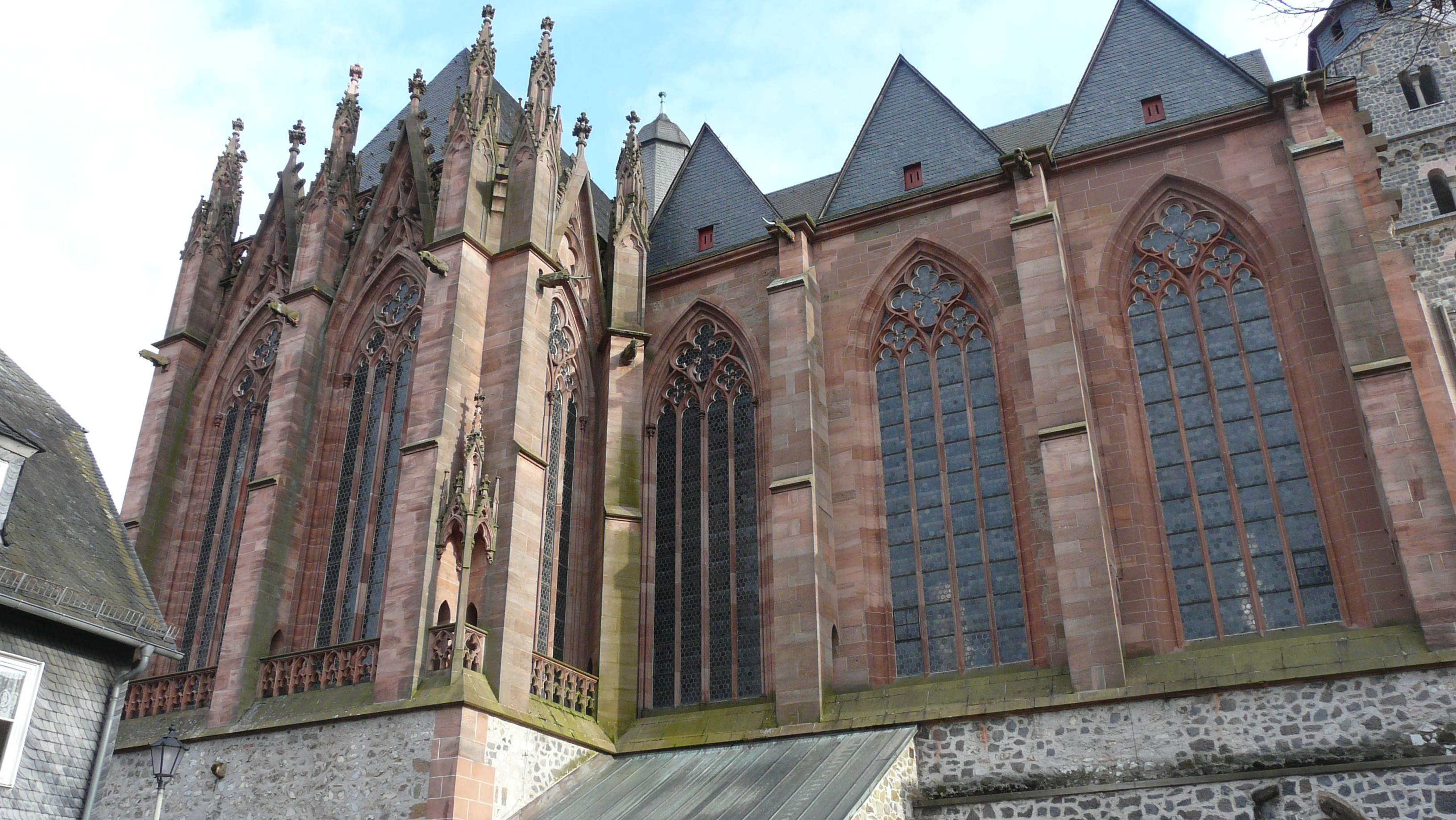 Nordseite des Wetzlarer Doms, Wetzlar (Hessen)